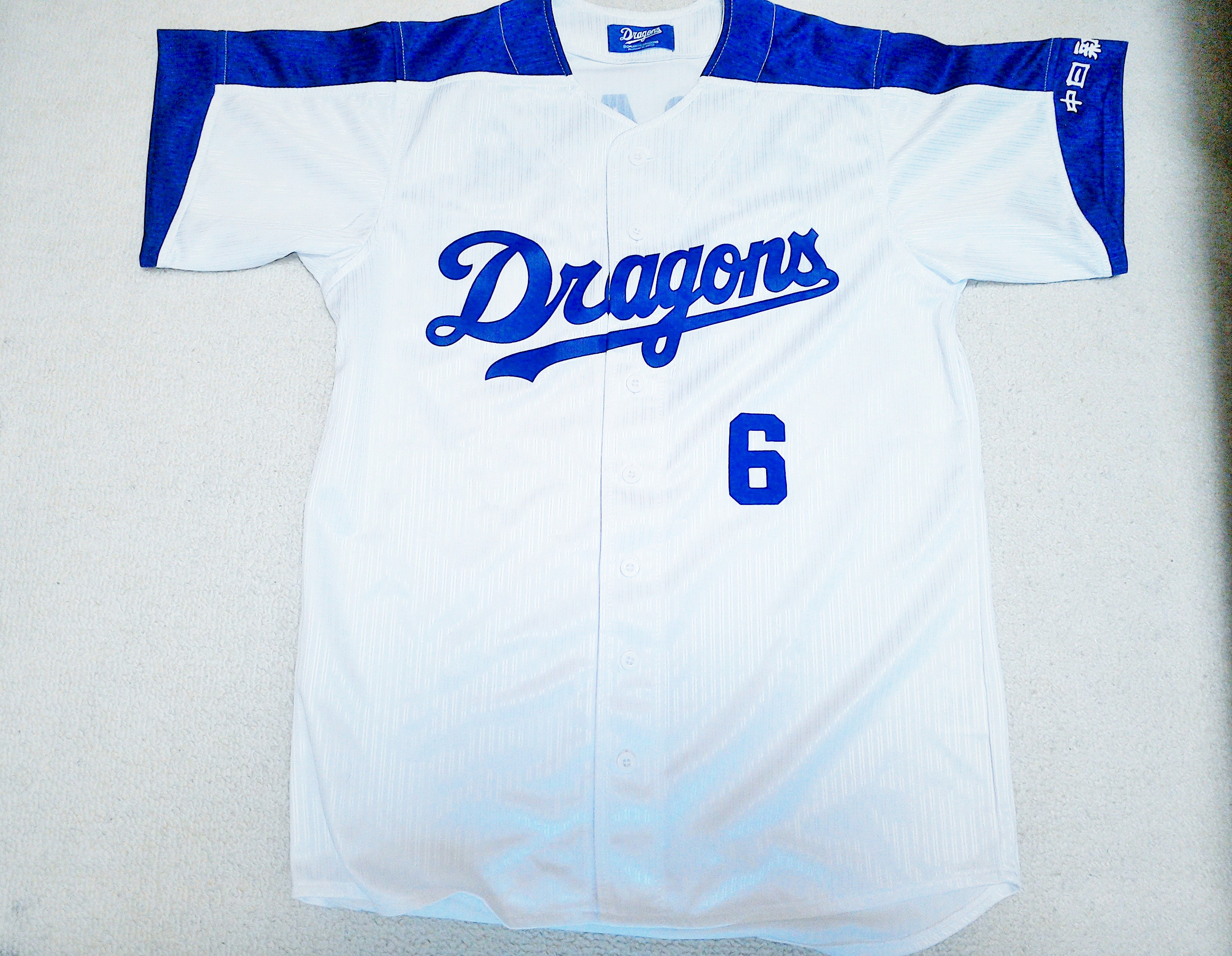 中日ドラゴンズのユニフォーム